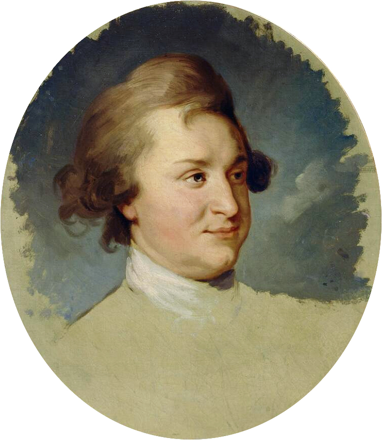 «И-Б. Лампи. Портрет Светлейшего князя Г. А. Потемкина-Таврического.»